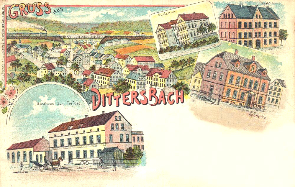 Dittersbach bei Waldenburg auf einer Postkarte von 1900